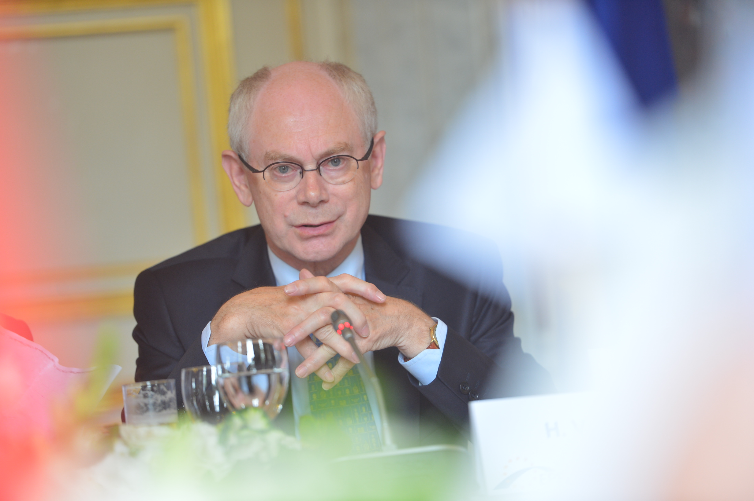 EPP Summit, 28 June 2012